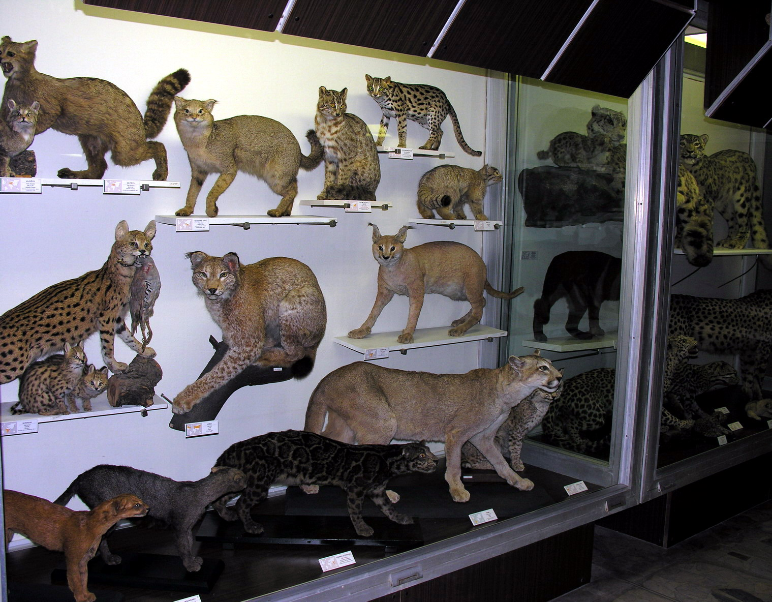 Tado Ivanausko zoologijos muziejus, Kaunas.